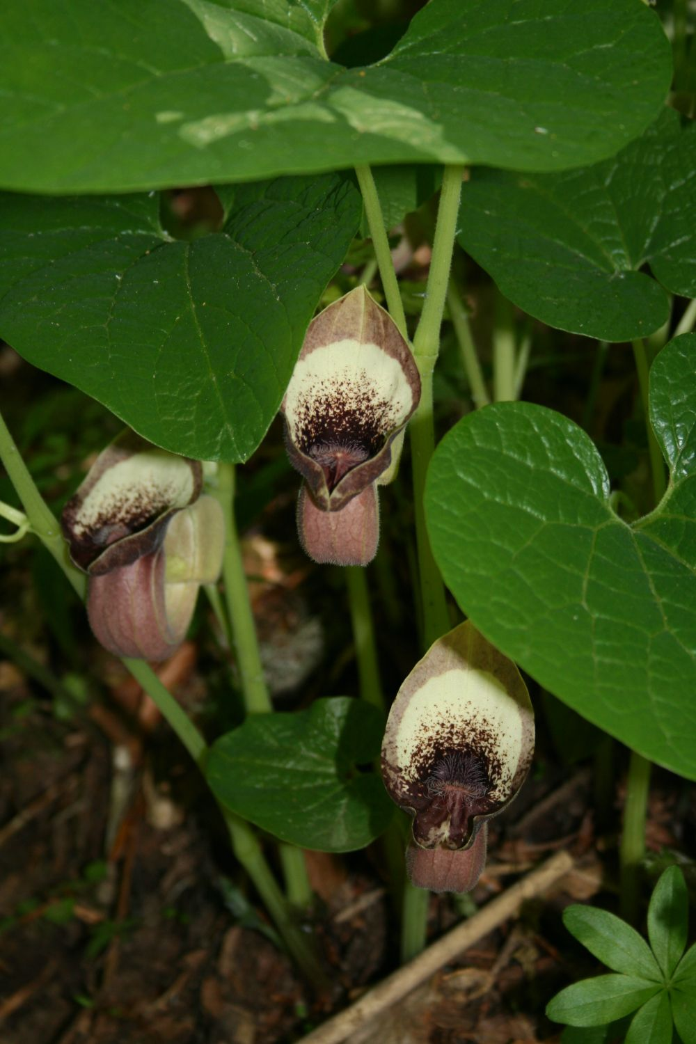 Aristolochia pontica, Osterluzeigewächse (Aristolochiaceae) - Türkei/Türkiye/Turkey: Prov. Bolu/Bolu ili, Bolu Dağları, ca. 2.7-2.8 km W Çeledoruğu Tepesi, Buchen-Tannenwald, ca. 1550 m